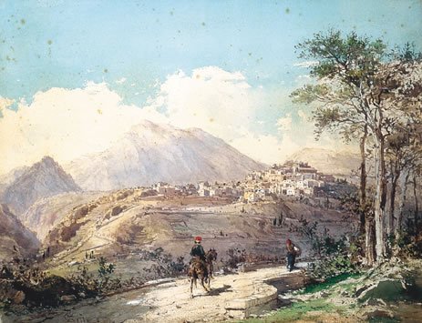 "Levens" (Alpes-Maritimes, France) en 1884, vu du quartier des Traverses, avec en arrière le mont Vial (1550m)